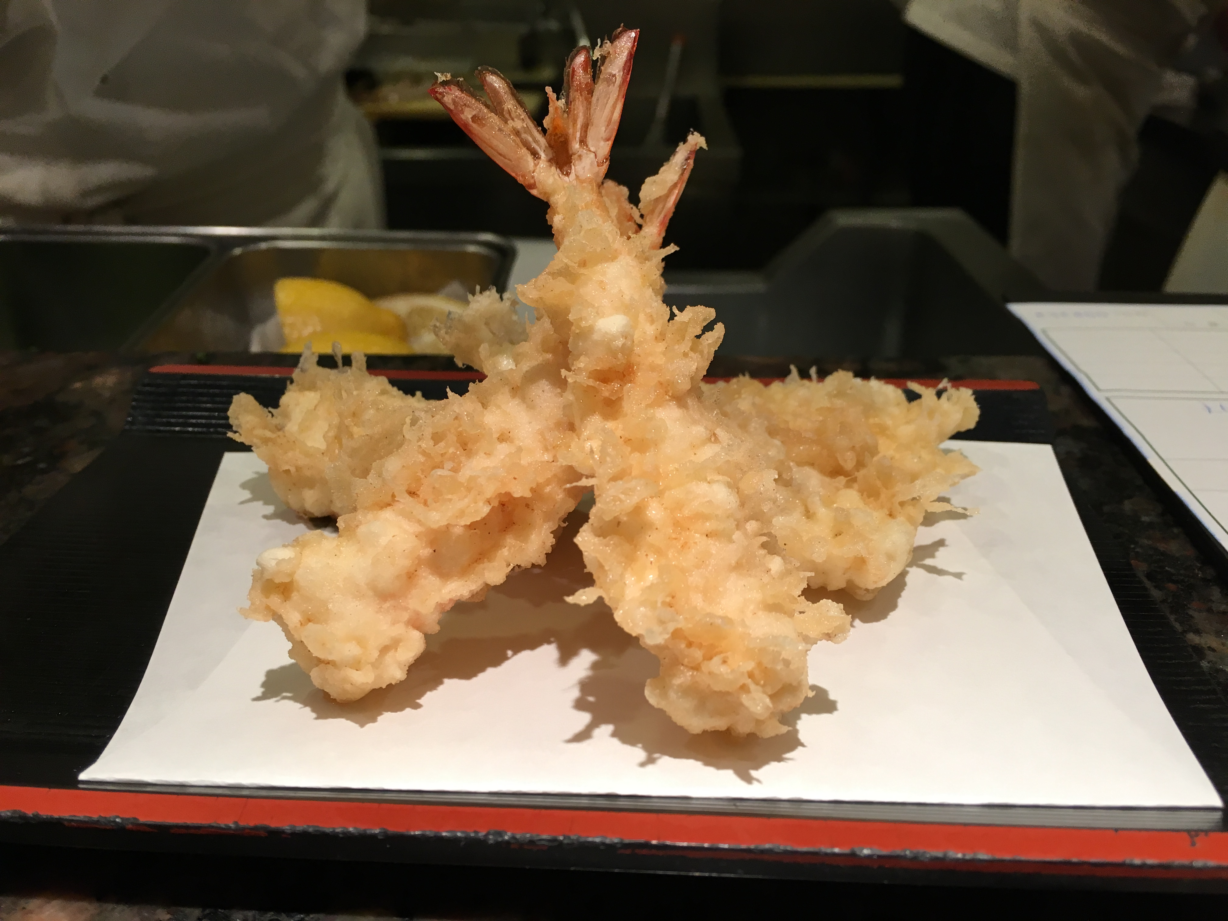 つな八